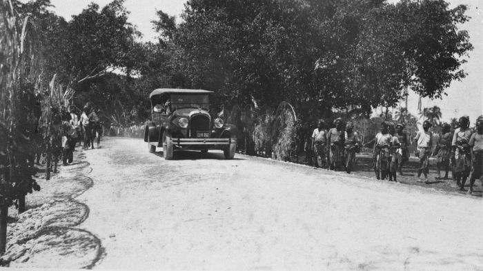 Foto. Auto bij Amoerassi, Timor